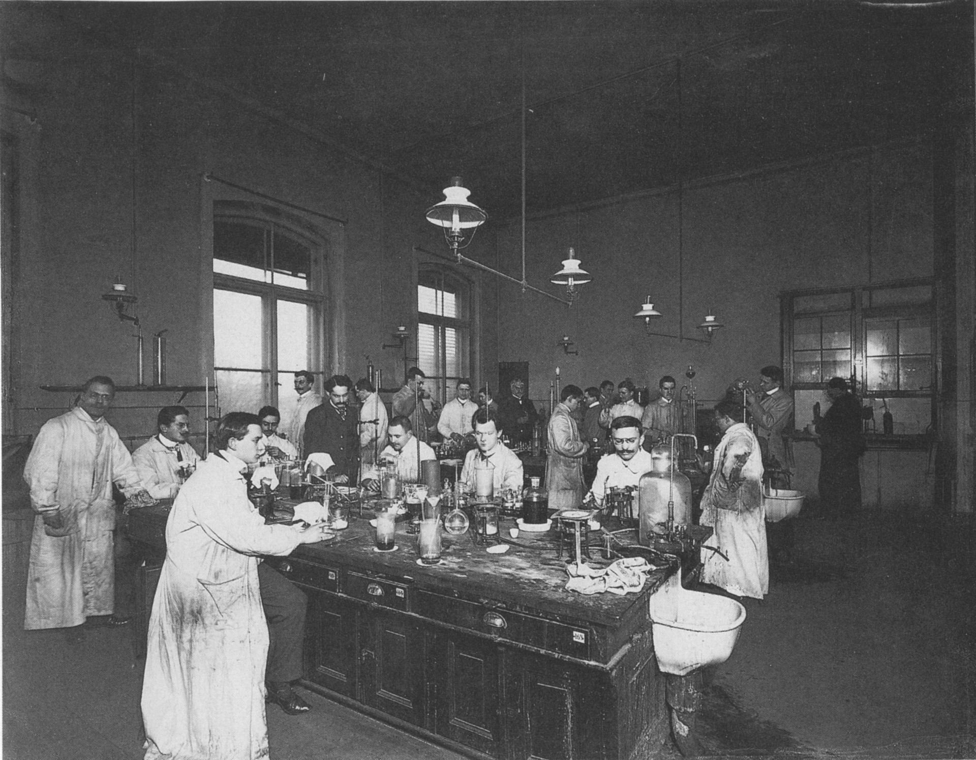 Labor des Chemischen Instituts der Universität, 1906